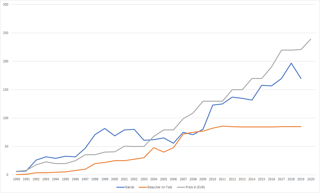 New version of the statistic